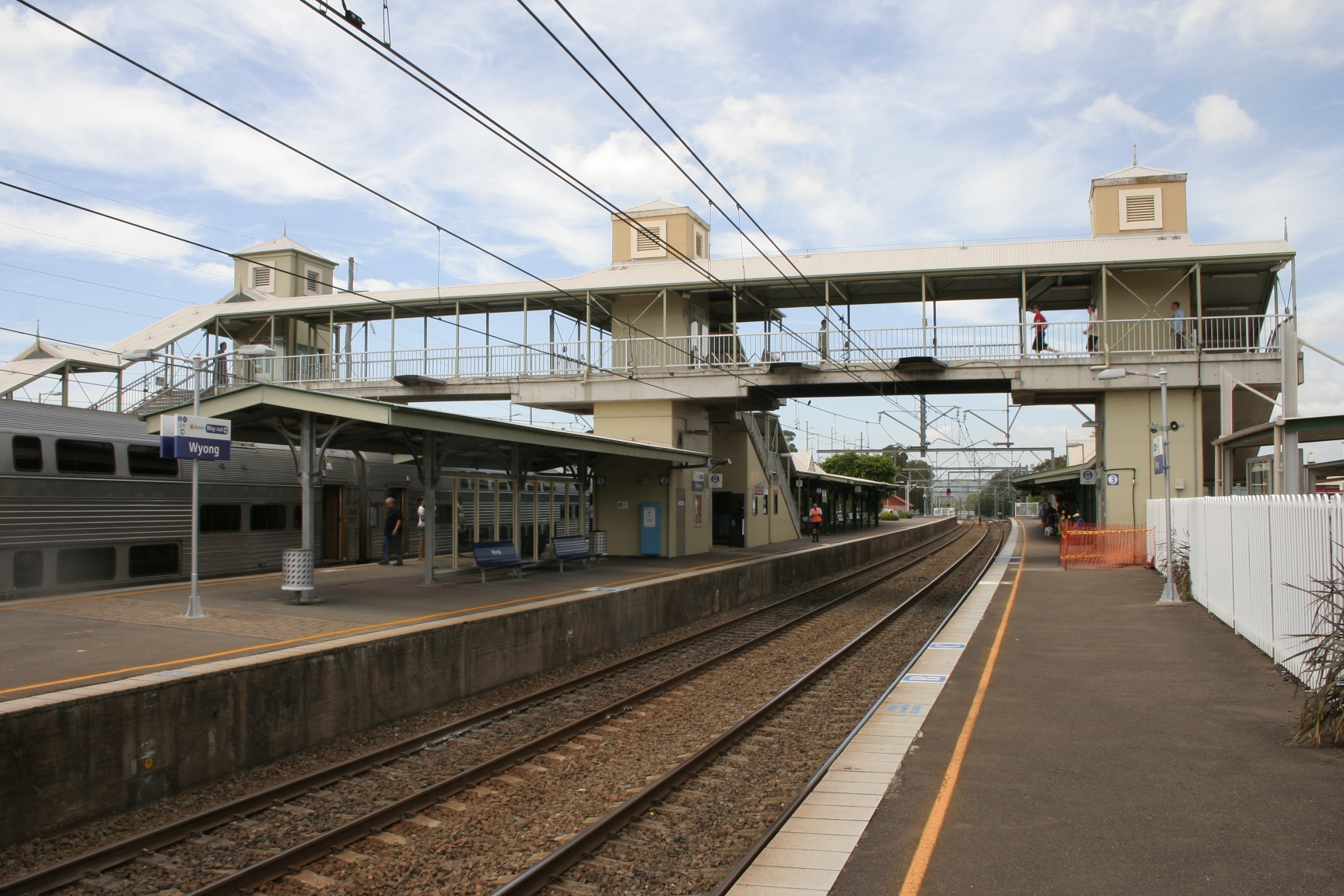 Wyong railway station